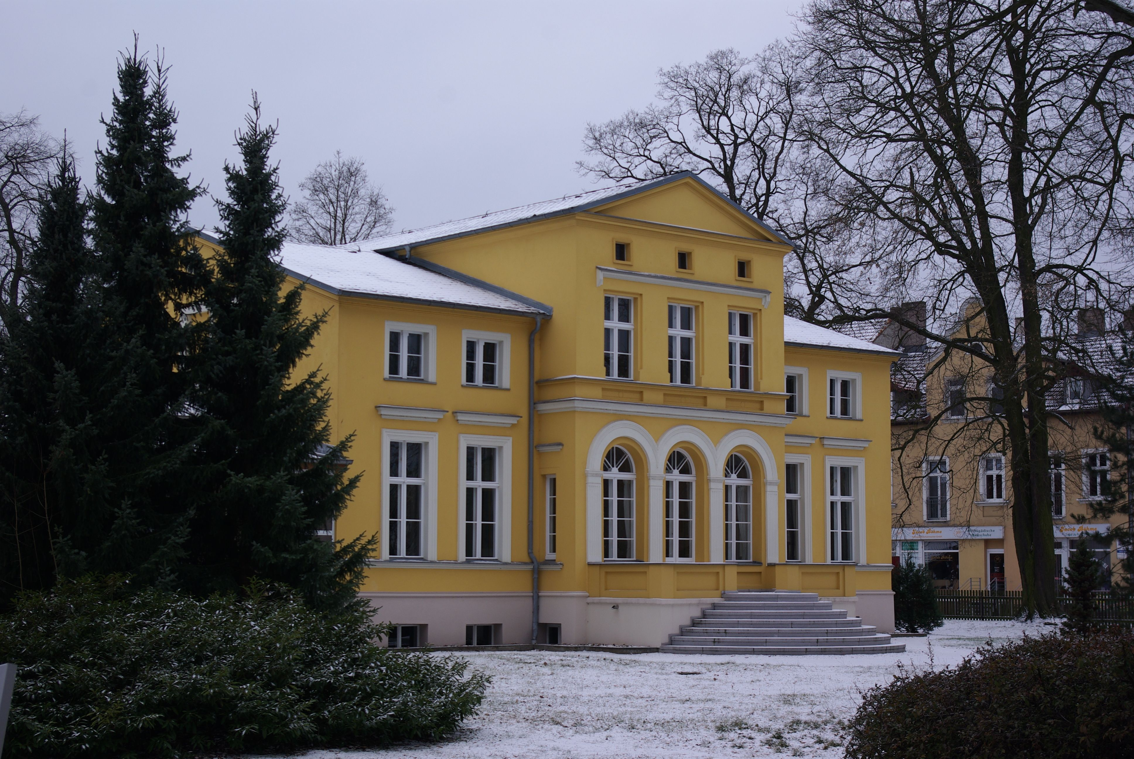 Erkner, Brandenburg. Die Villa Lassen, heute befindet sich das Gerhart-Hauptmann-Museum im Gebäude. Gerhart Hauptmann hat hier von 1885 bis 1889 gewohnt (geotags in den exif-Daten).